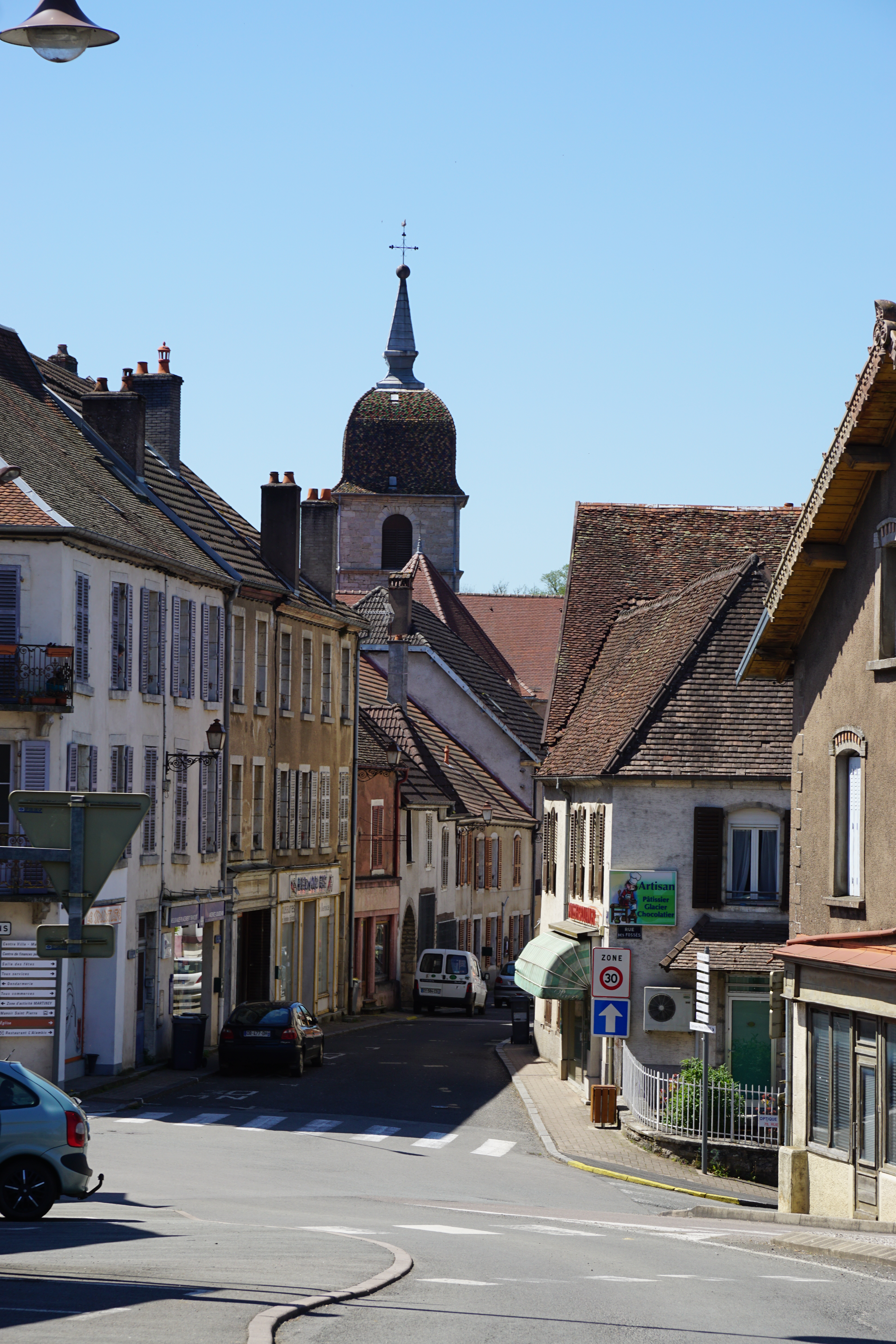 Villersexel.